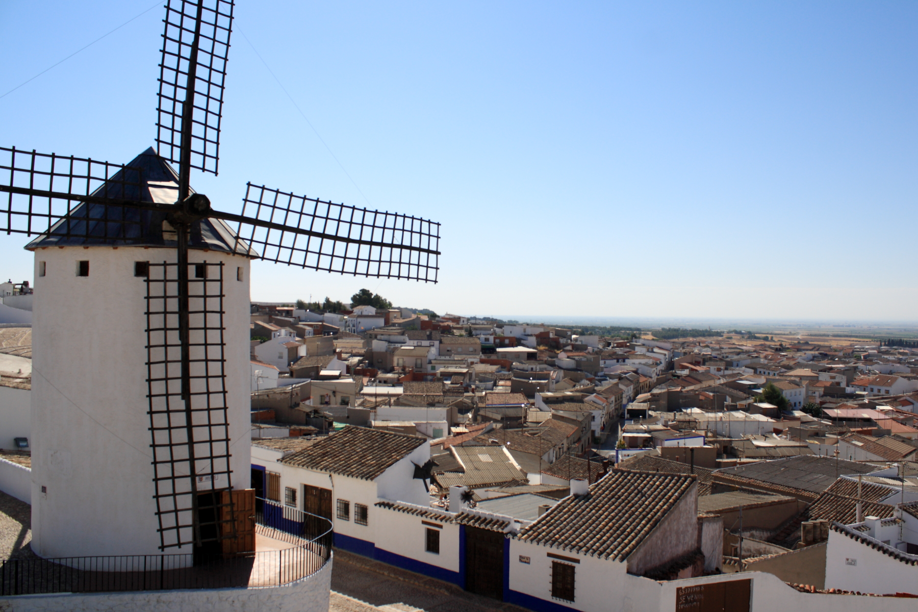 Campo de Criptana Provincia de Ciudad Real Castilla la Mancha España